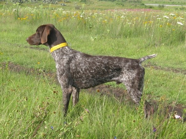 Momento de "muestra" Braco Alemán o Pointer Alemán de pelo corto